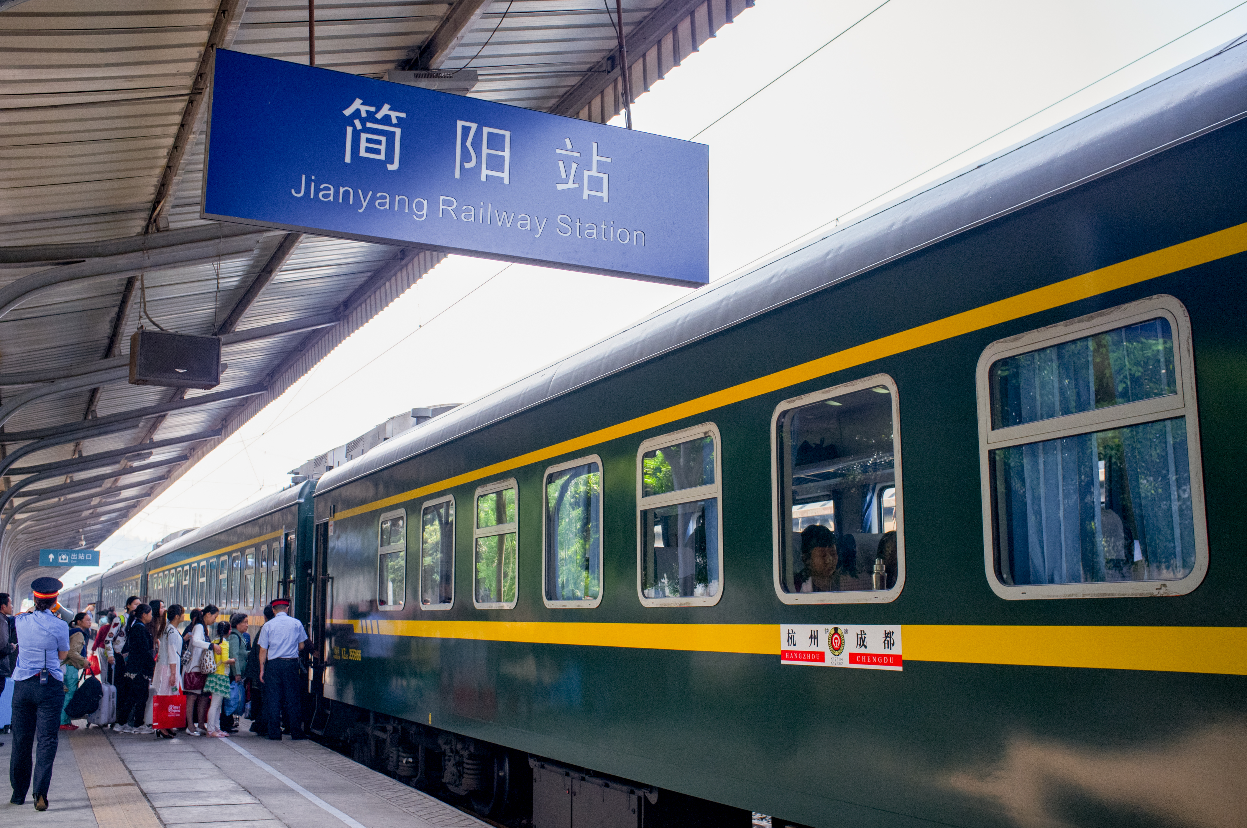 中文（中国大陆）: 国铁成渝铁路简阳站站台